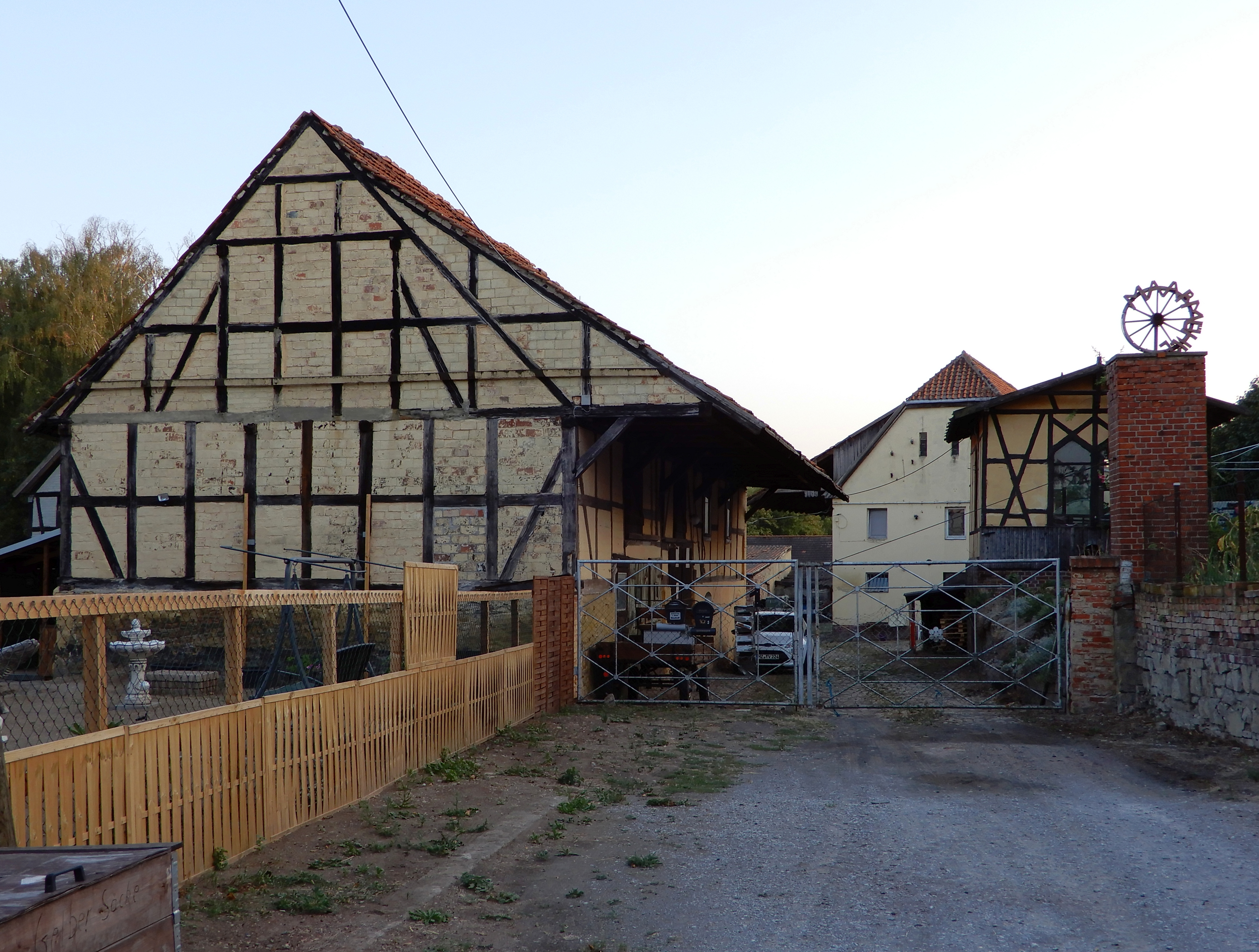 Alte Maasmühle Weddersleben